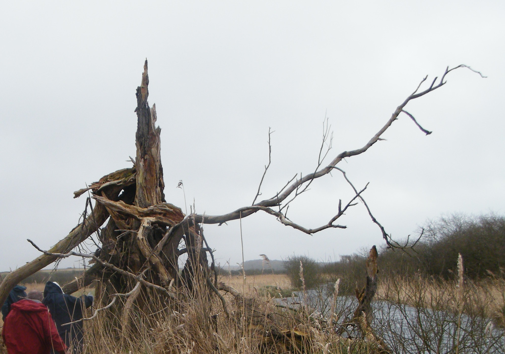 Villers-sur-Authie, Somme, Fr, marais du Pendé, Grands Viviers, arbre mort. À droite, le Pendé, affluent de l'Authie, en période de hautes eaux.